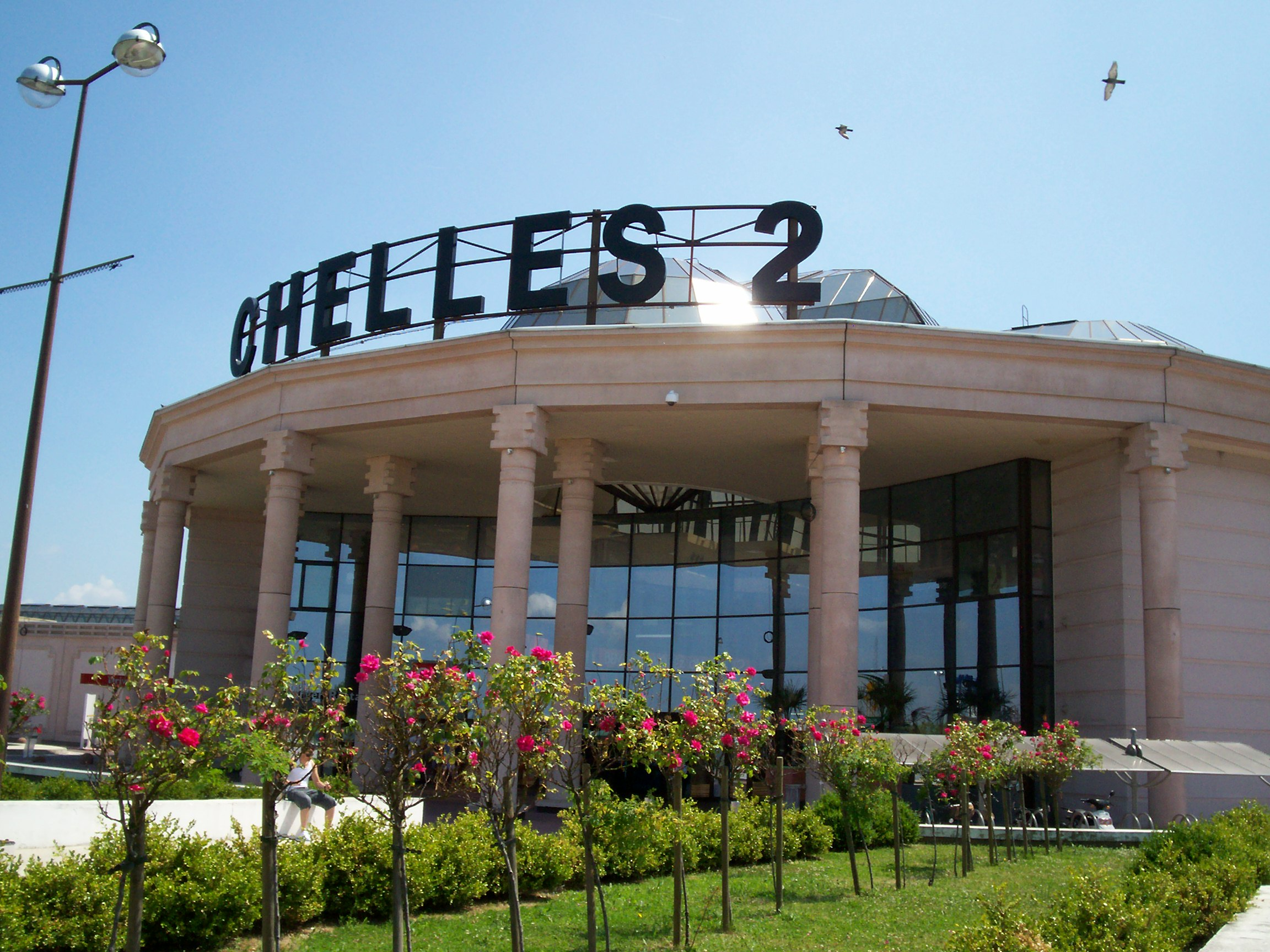 Porte 2 de Chelles2